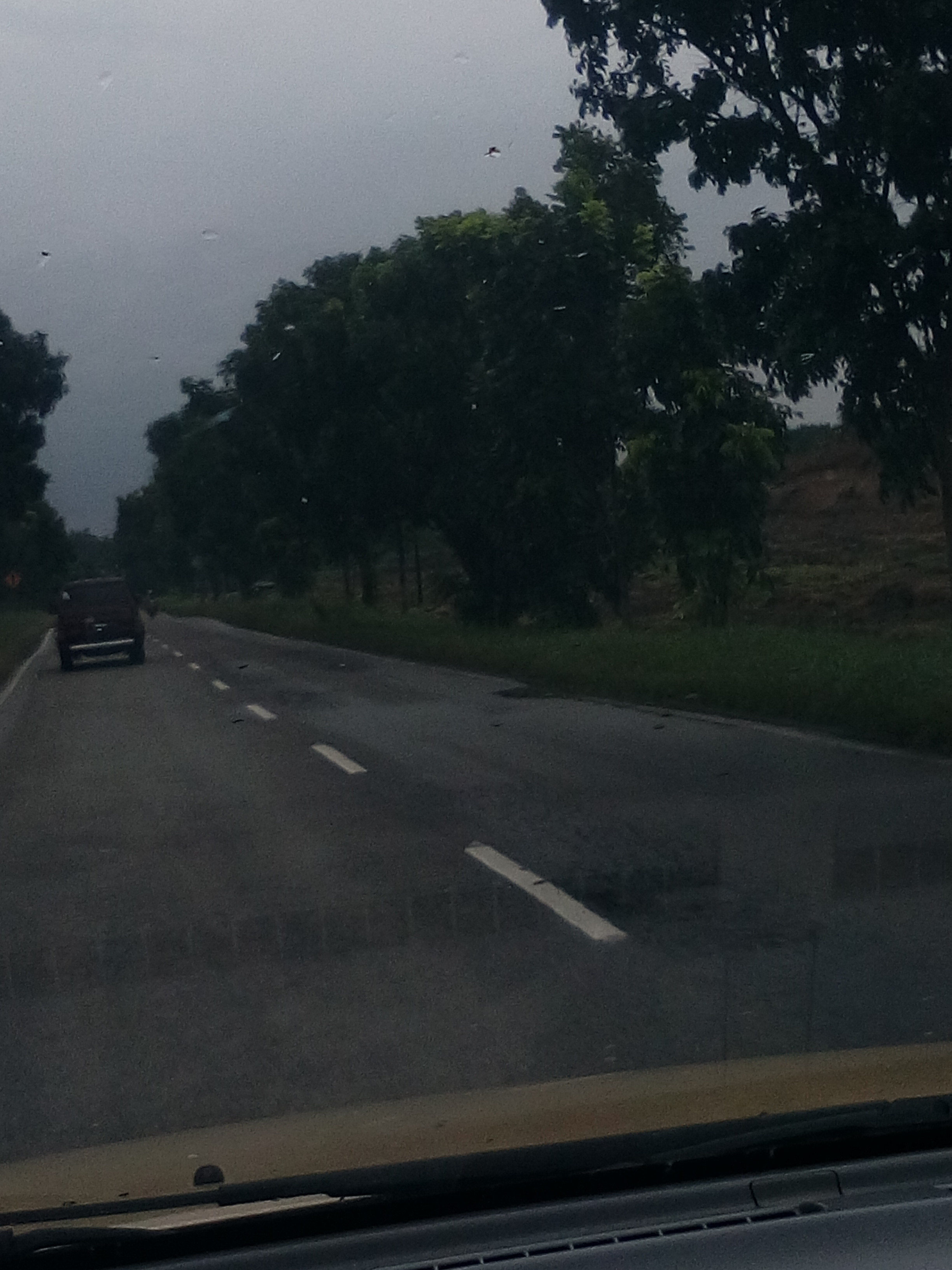 Jalan diantara perkebunan sawit